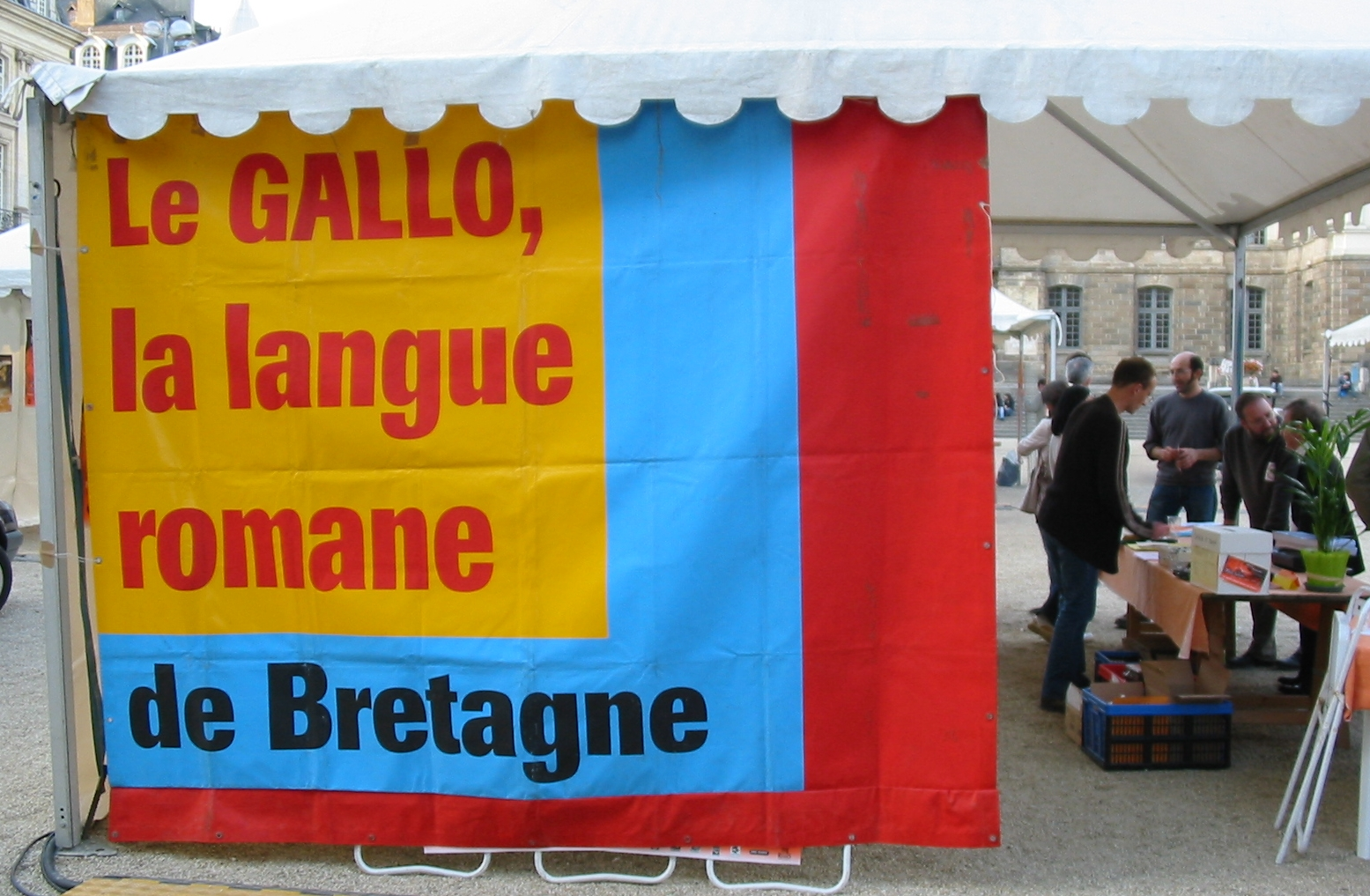 Êcritchieau à la Fête Mill Góll en Pays Gallo 2007